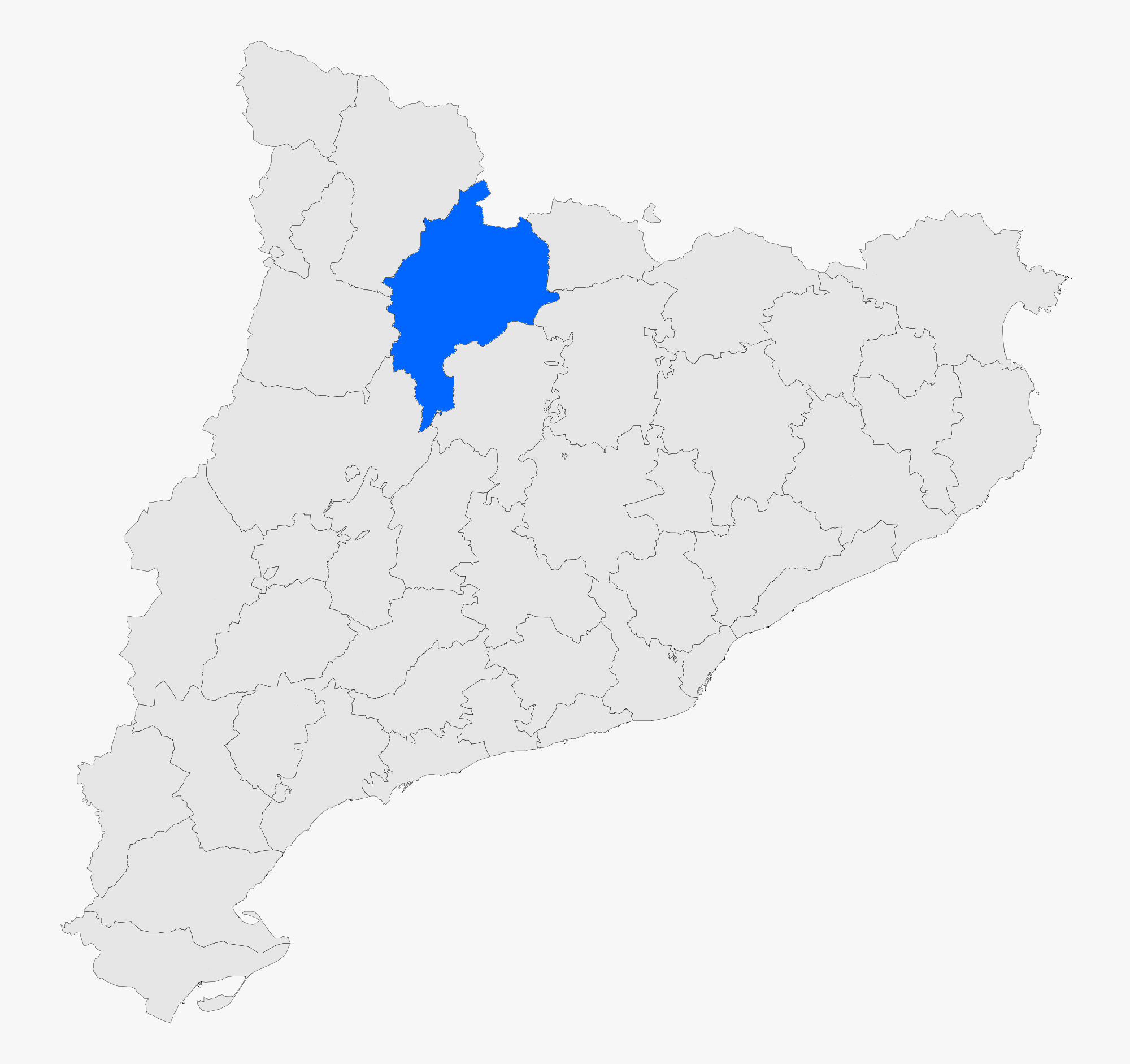 jkfhcffol